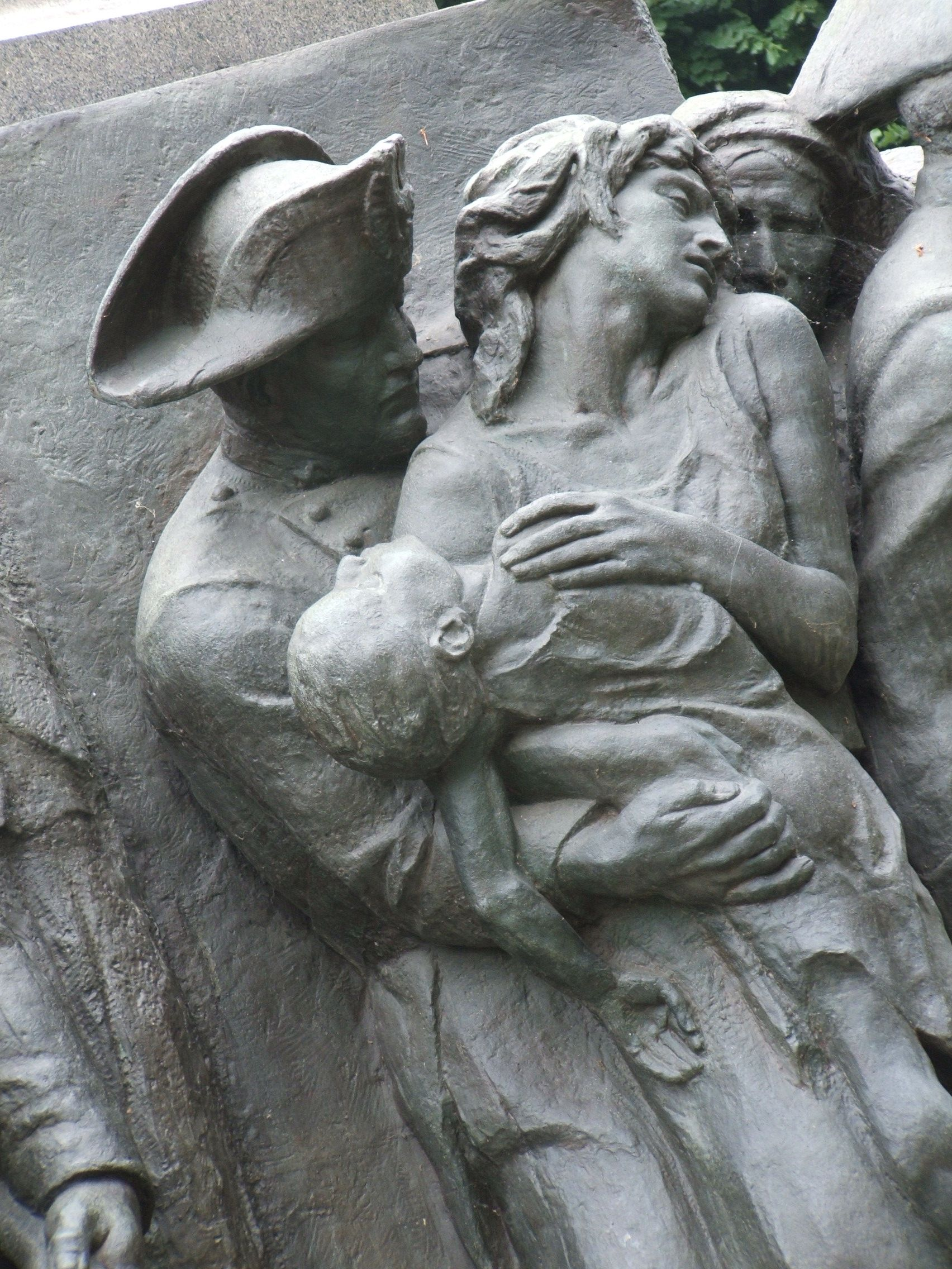 Monumento Nazionale al Carabiniere, 6 giugno 2008.